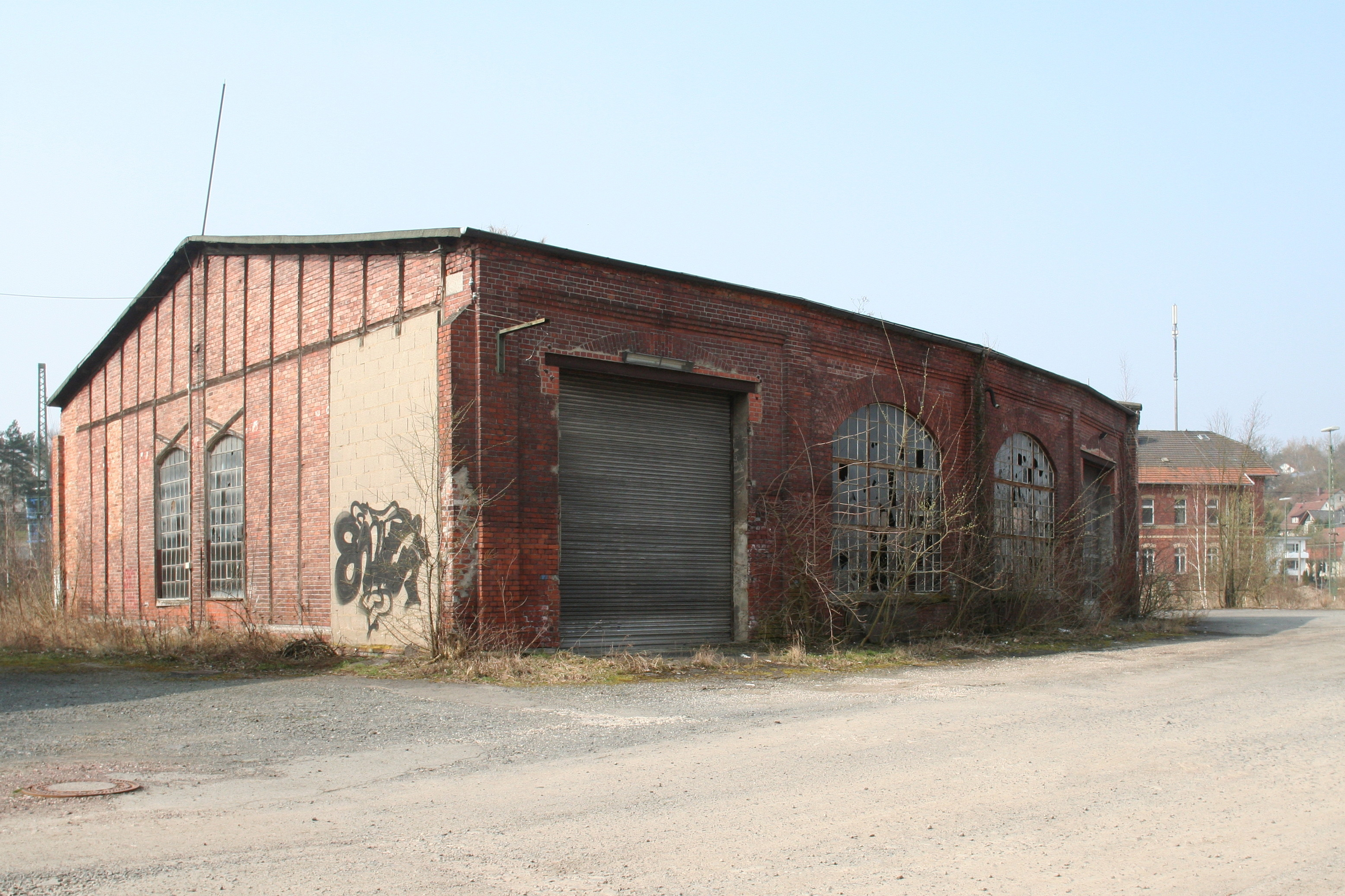 Coburger Güterbahnhof, Lokschuppen von 1902